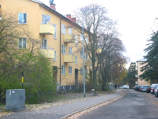 Hammarbyhöjden i Stockholm Foto: Erik Berg